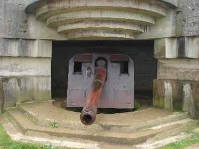 Bunker de artilharia alemão WWII